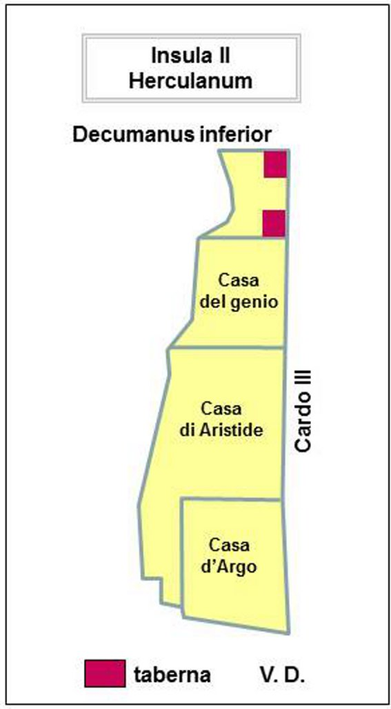 Herculanum Plan sommaire de l'insula II